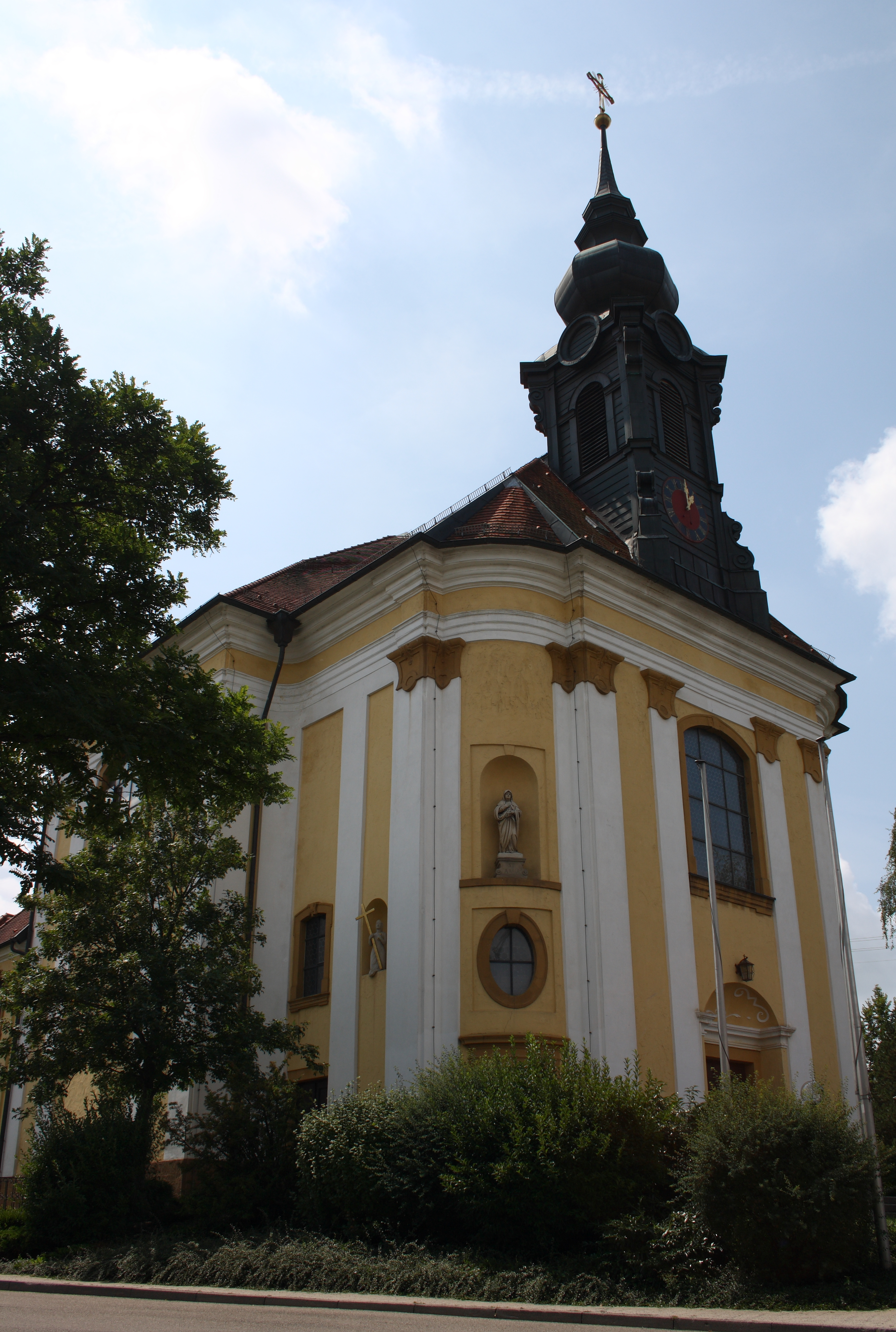 Wallfahrtskirche Mariä Heimsuchung (Zu Unserer lieben Frau vom Roggenacker) in Flochberg, einem Stadtteil von Bopfingen im Ostalbkreis (Baden-Württemberg)